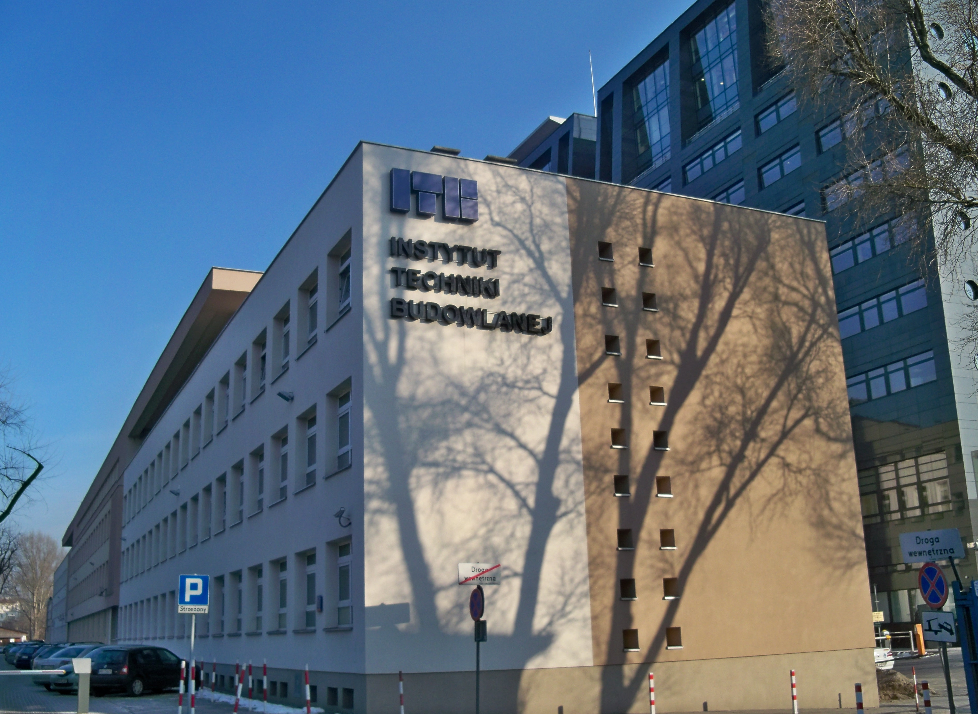 Instytut Techniki Budowlanej, ul. Filtrowa 1 w Warszawie.